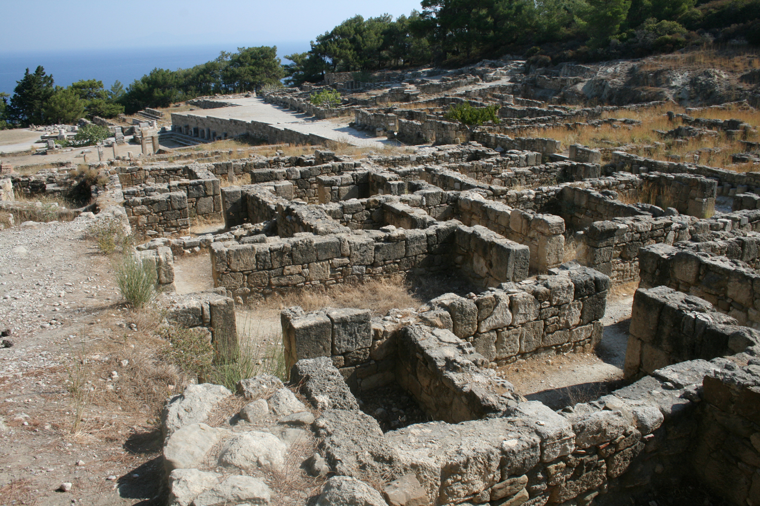 Excavations of old Rhodes town Kámiros destroyed by earthquake Vykopávky starébylého města Kámiros zničeného zemětřesením Photo August 2007 Author= Karelj